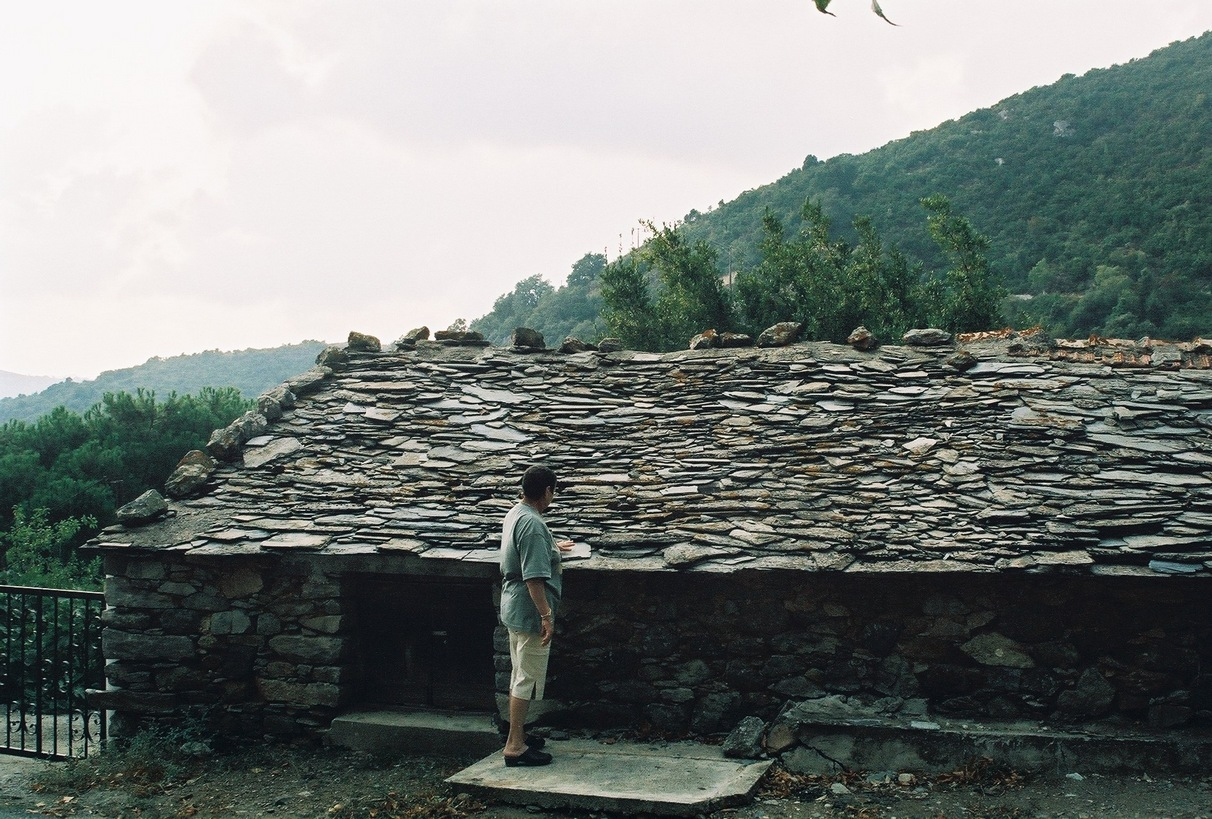 Tox (Haute-Corse), vieille maison dans le village